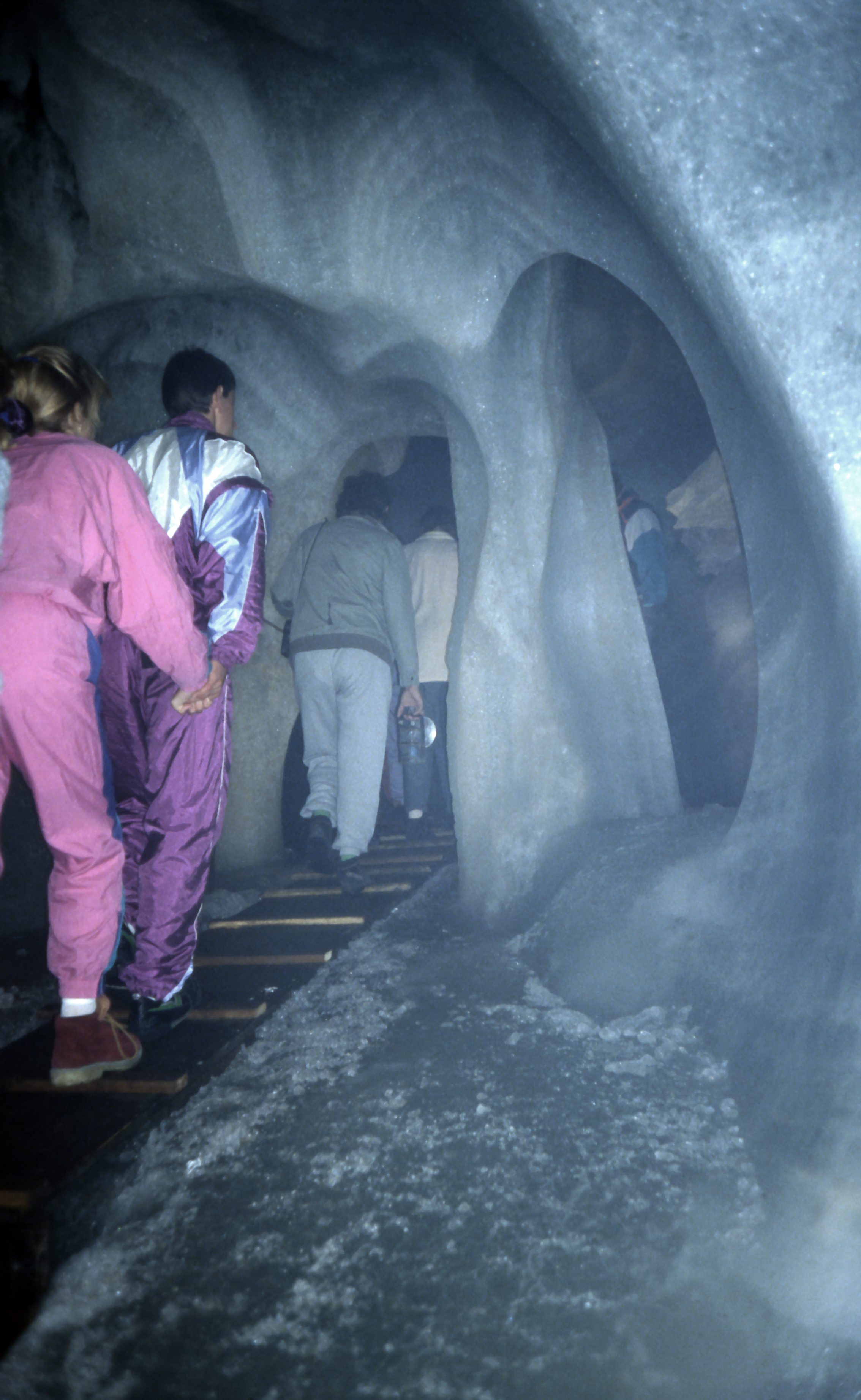 Schellenberger Eishöhle (1993)